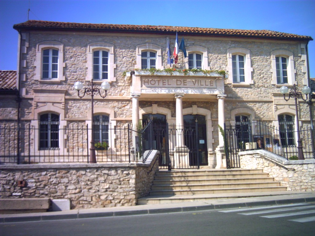 La mairie de Lançon-Provence (Bouches-du-Rhône, France)